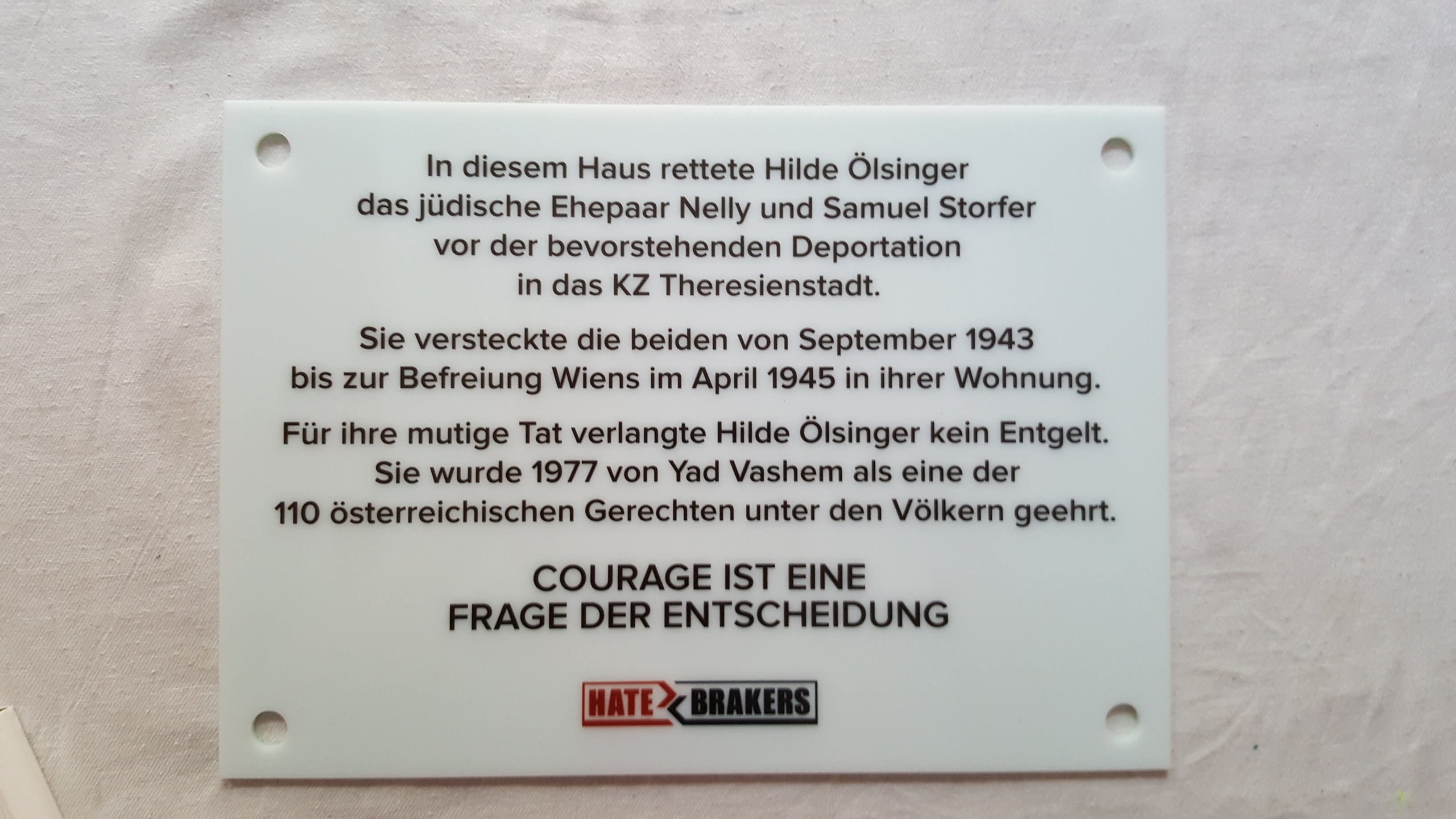 Gedenktafel für Hilde Ölsinger, eine der österreichischen Gerechten unter den Völkern, angebracht am Haus Leyserstraße 5, Wien